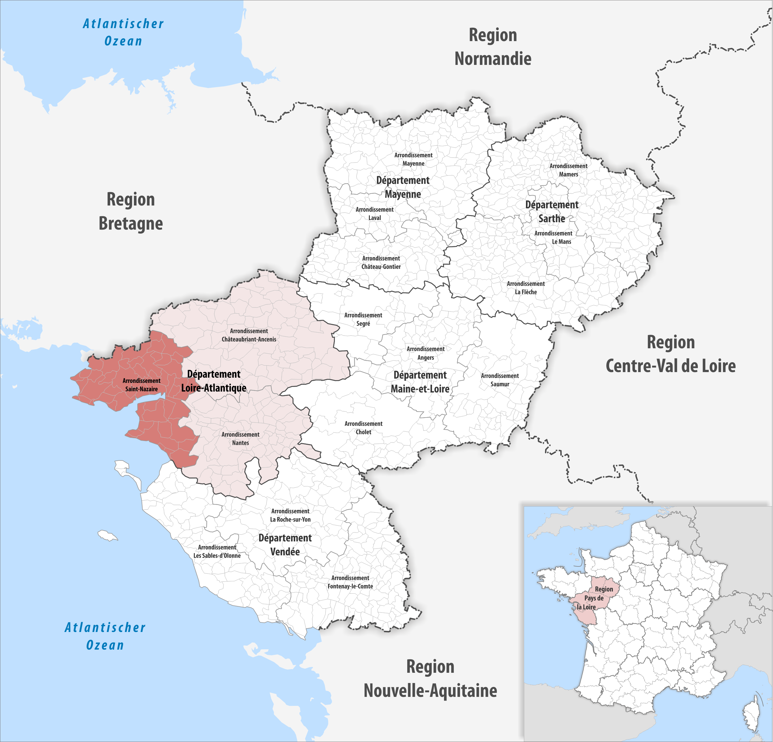 Lage des Arrondissements Saint-Nazaire